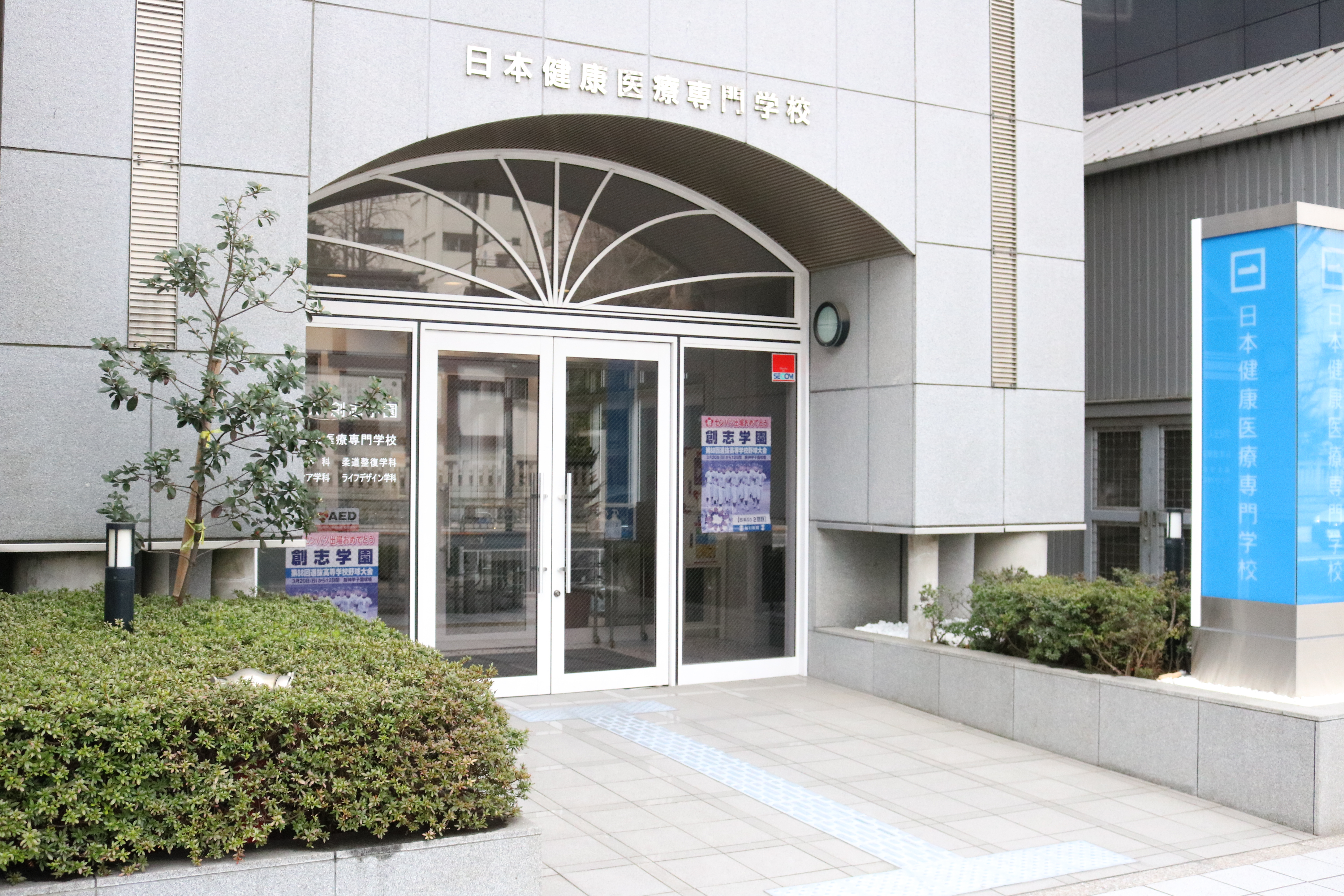 学校の外観